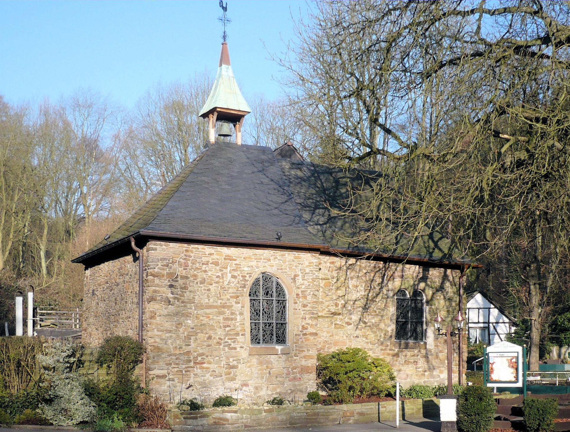 Klusenkapelle St. Ägidius in Essen-Bredeney